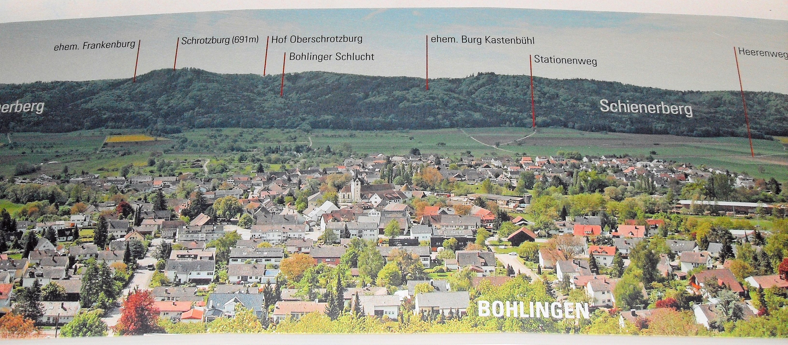 Blick auf Bohlingen auf einem der fünf auf der Galgenberg-Aussichtsplattform öffentlich aufgestellten Schaubildern